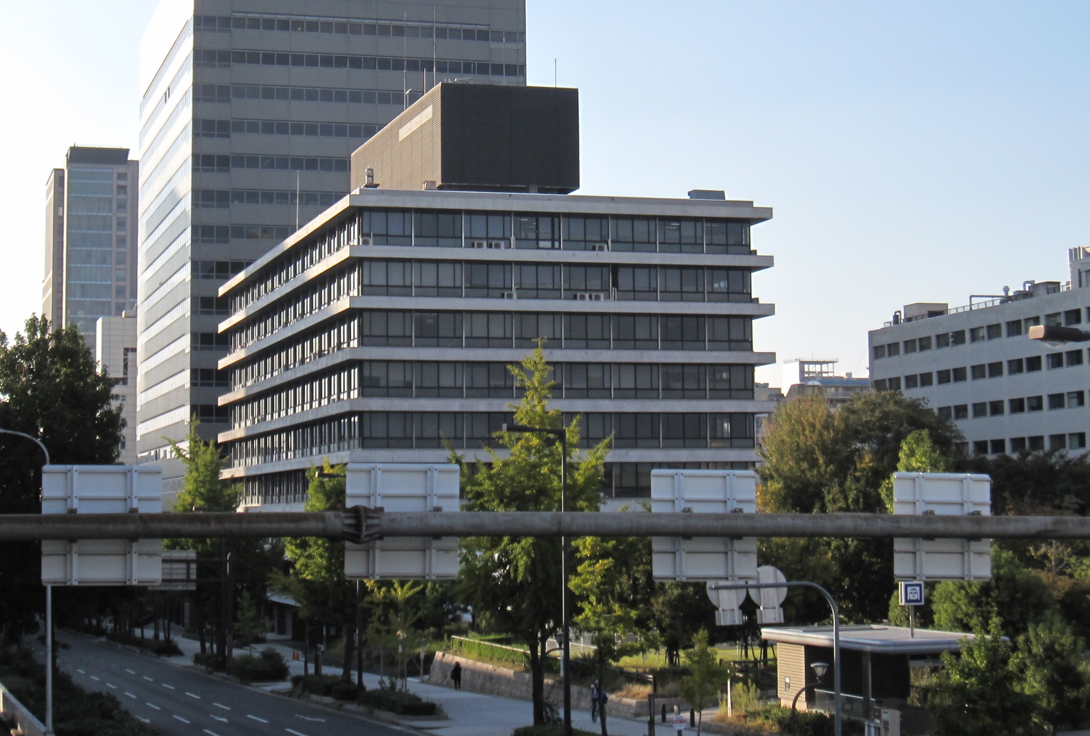 大阪合同庁舎第2号館（入居官署一覧）